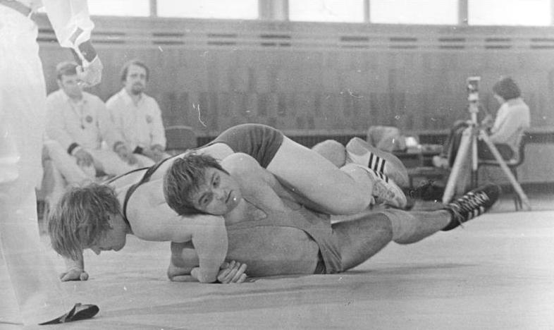 Roland Gehrke, Fred Rosentreter ADN-ZB Liebers-20.11.76 Bez. Gera: DDR-Meisterschaften im Ringen (Freistil): Im Ringen ermittelten die Freistil-Spezialisten in Jena am 20.11.76 ihre Meister. In der Gewichtsklasse 100 kg setzte sich Roland Gehrke (Dynamo Luckenwalde- oben) gegen Fred Rosentreter vom SC Halle durch.